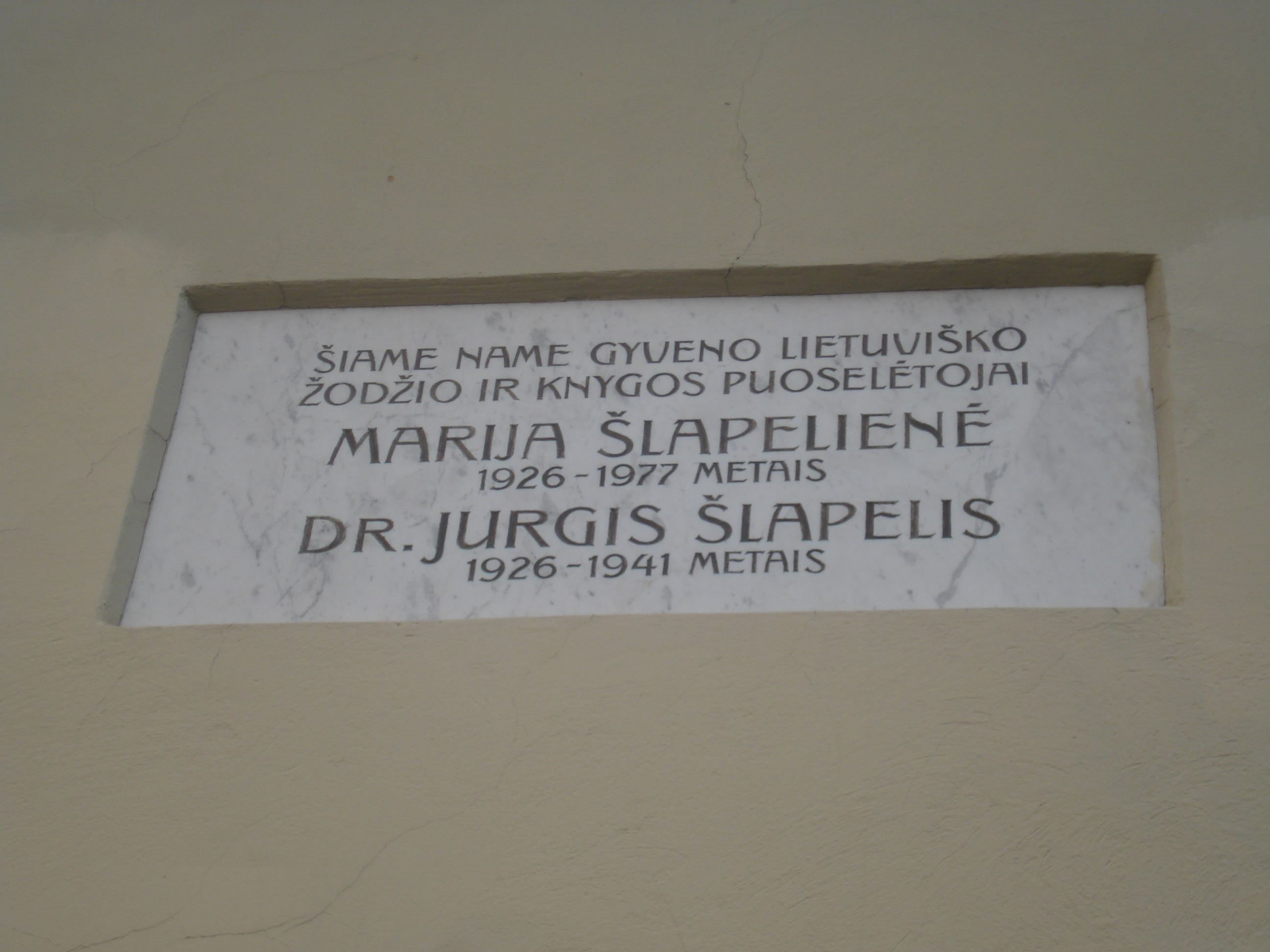 Marija Šlapeliene and Jurgis Šlapelis, Lithuanian booksellers memorial plaque in Vilnius (Pilies g. 40).